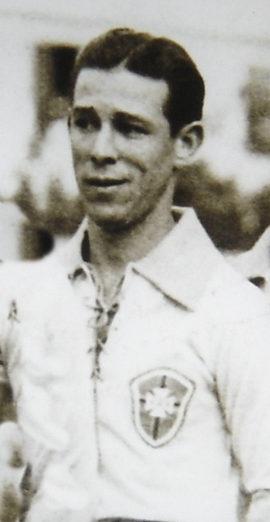 Luís dos Santos Luz (Porto Alegre, 29 de novembro de 1909 — Porto Alegre, 27 de agosto de 1989) foi um futebolista brasileiro que atuou como zagueiro e disputou a Copa do Mundo de 1934 , na Itália.